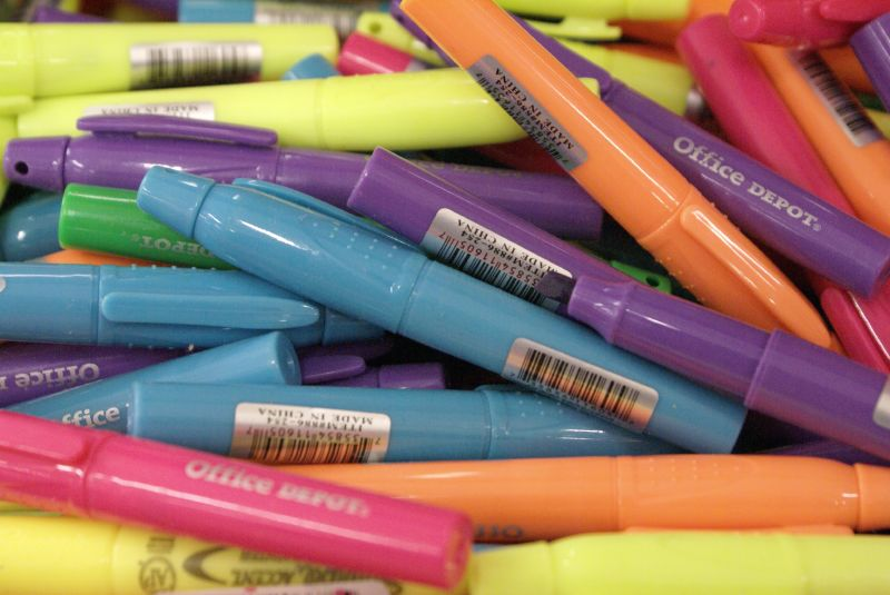 Minizvýrazňovače